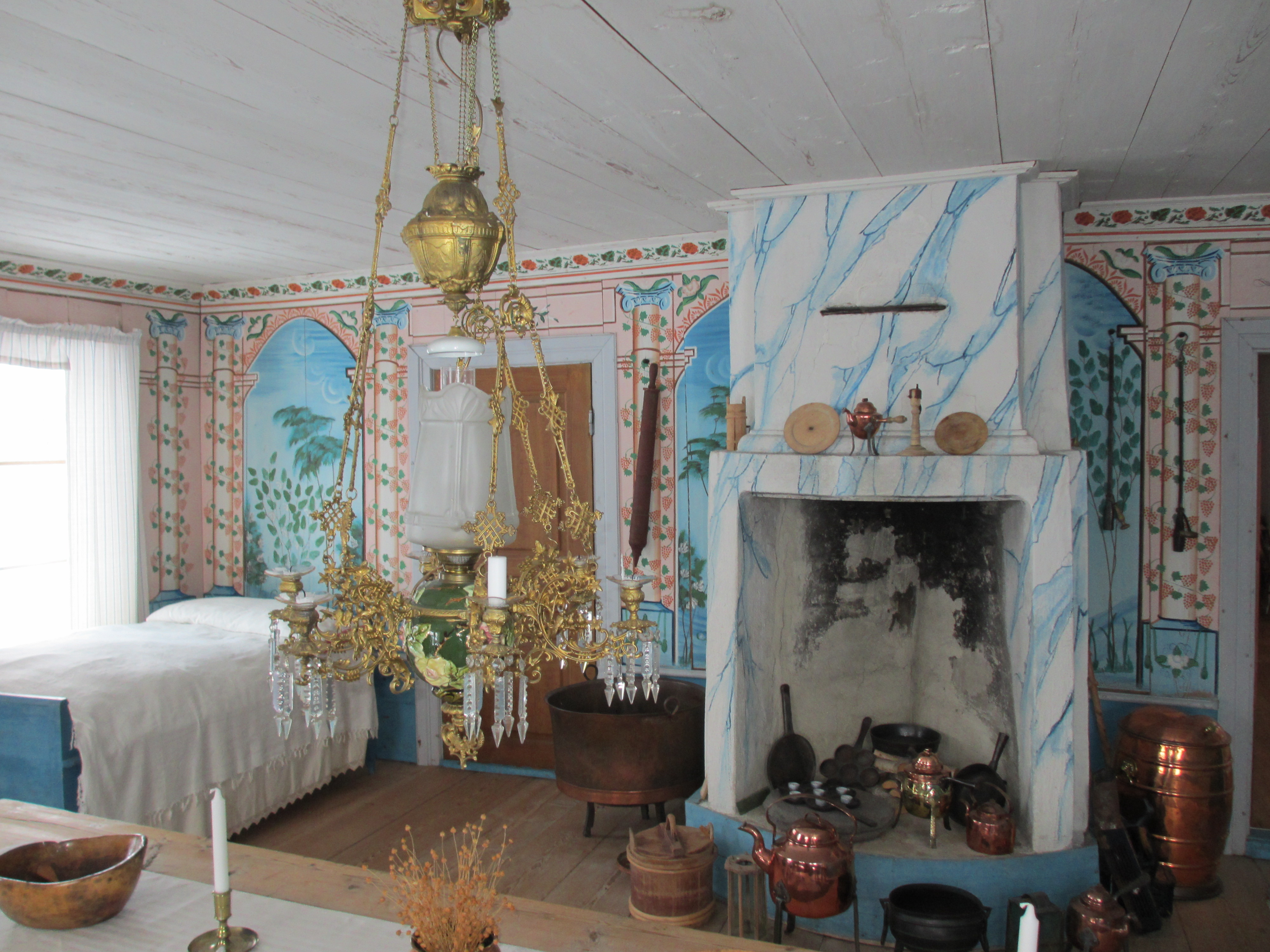 Jon-Lars